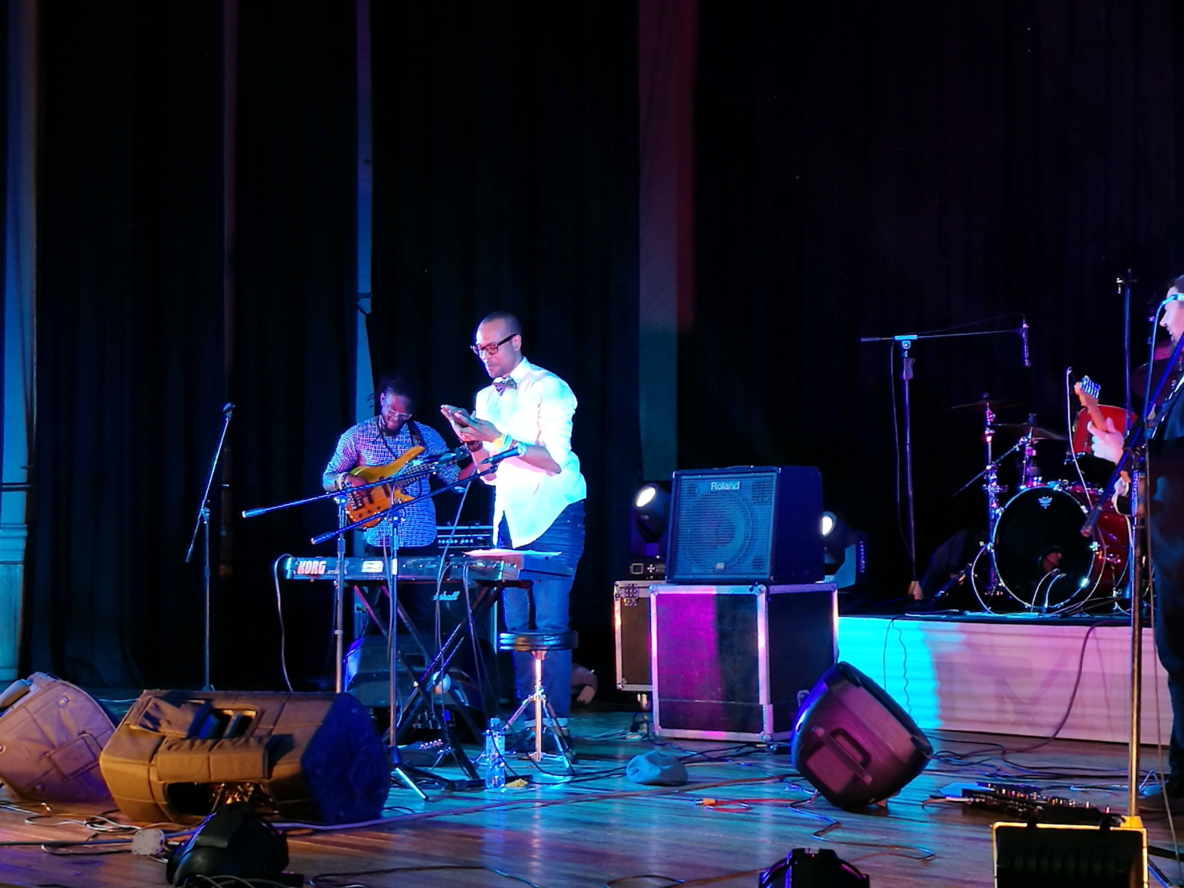 Kenny Wesley en concert a Cajamarca el gener de 2017